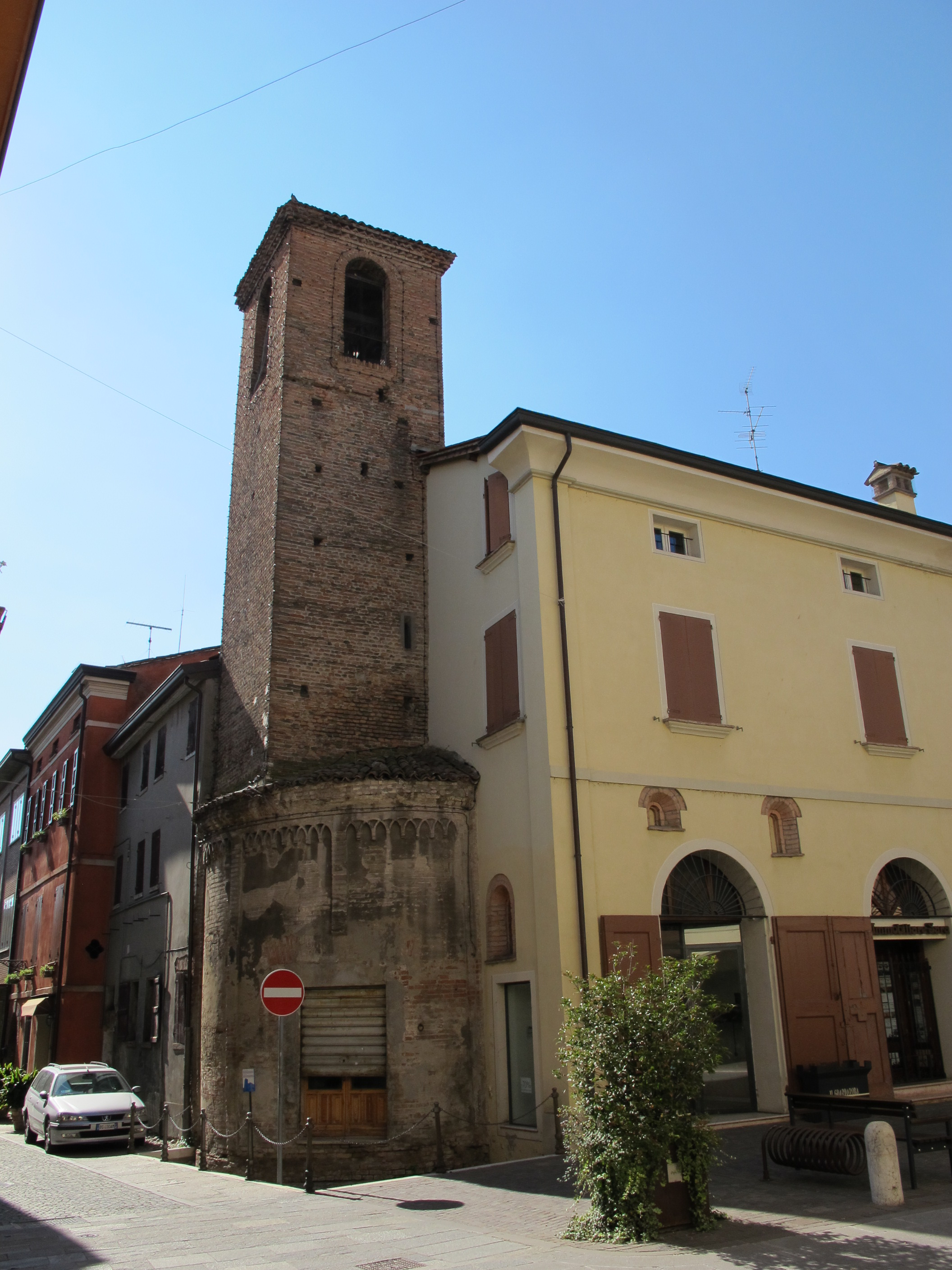 Abside e torre dell'antica chiesa di rubiera